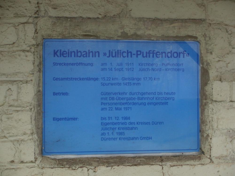 Gedenktafel zur Geschichte der Jülicher Kreisbahn am ehemaligen Bahnhofsgebäude in Merzenhausen